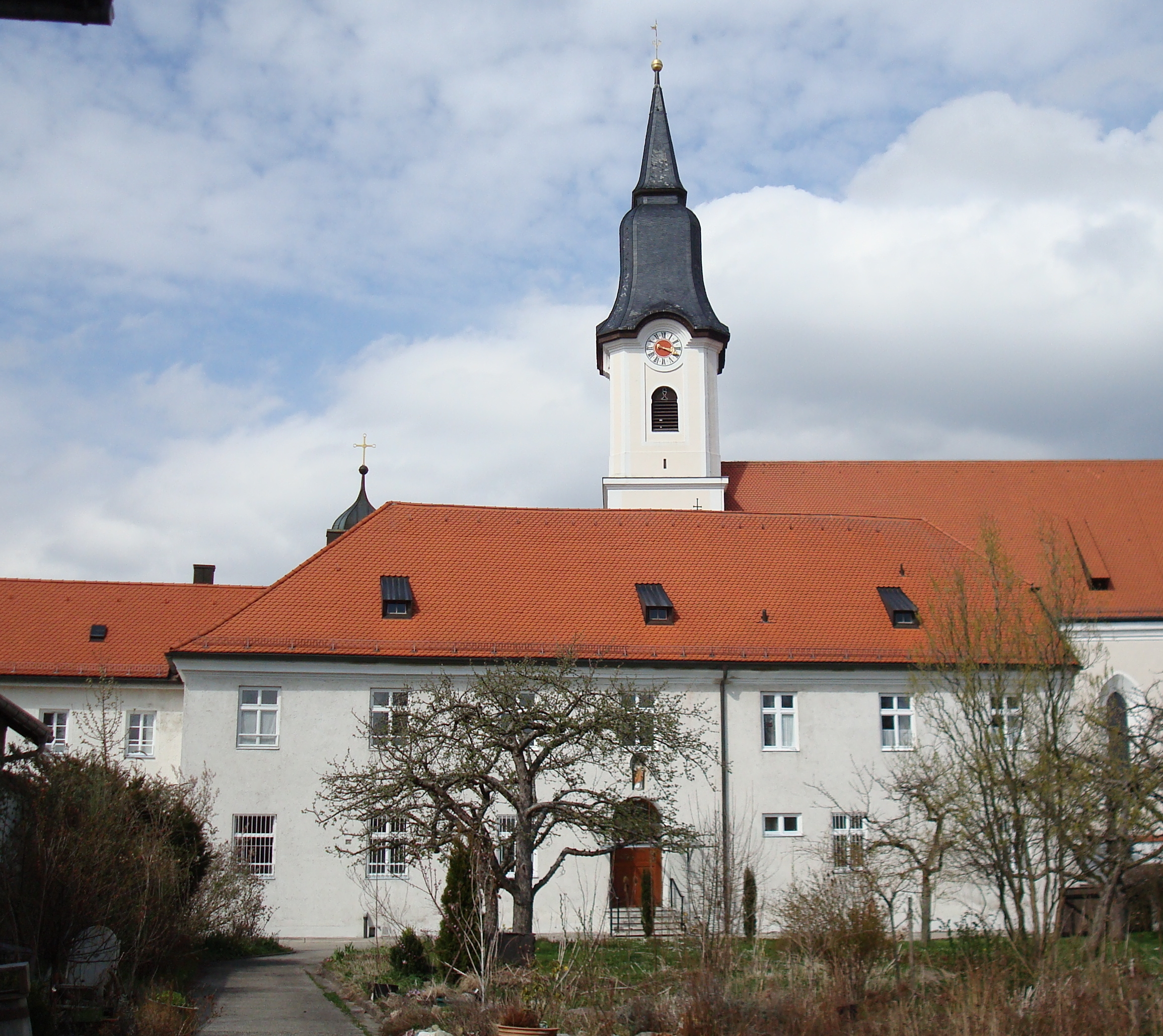 Berg am Starnberger See, Ortsteil Aufkirchen, Marienplatz 1. Klostergebäude und ehemaliger Pfarrhof. Zweigeschossiger hakenförmiger Bau mit Krüppelwalmdach aus dem 17. Jahrhundert. Der neue Teil der Anlage entstand am Anfang des 20. Jahrhunderts. Im Hintergrund Kirche Mariä Himmelfahrt.This is a photograph of an architectural monument.